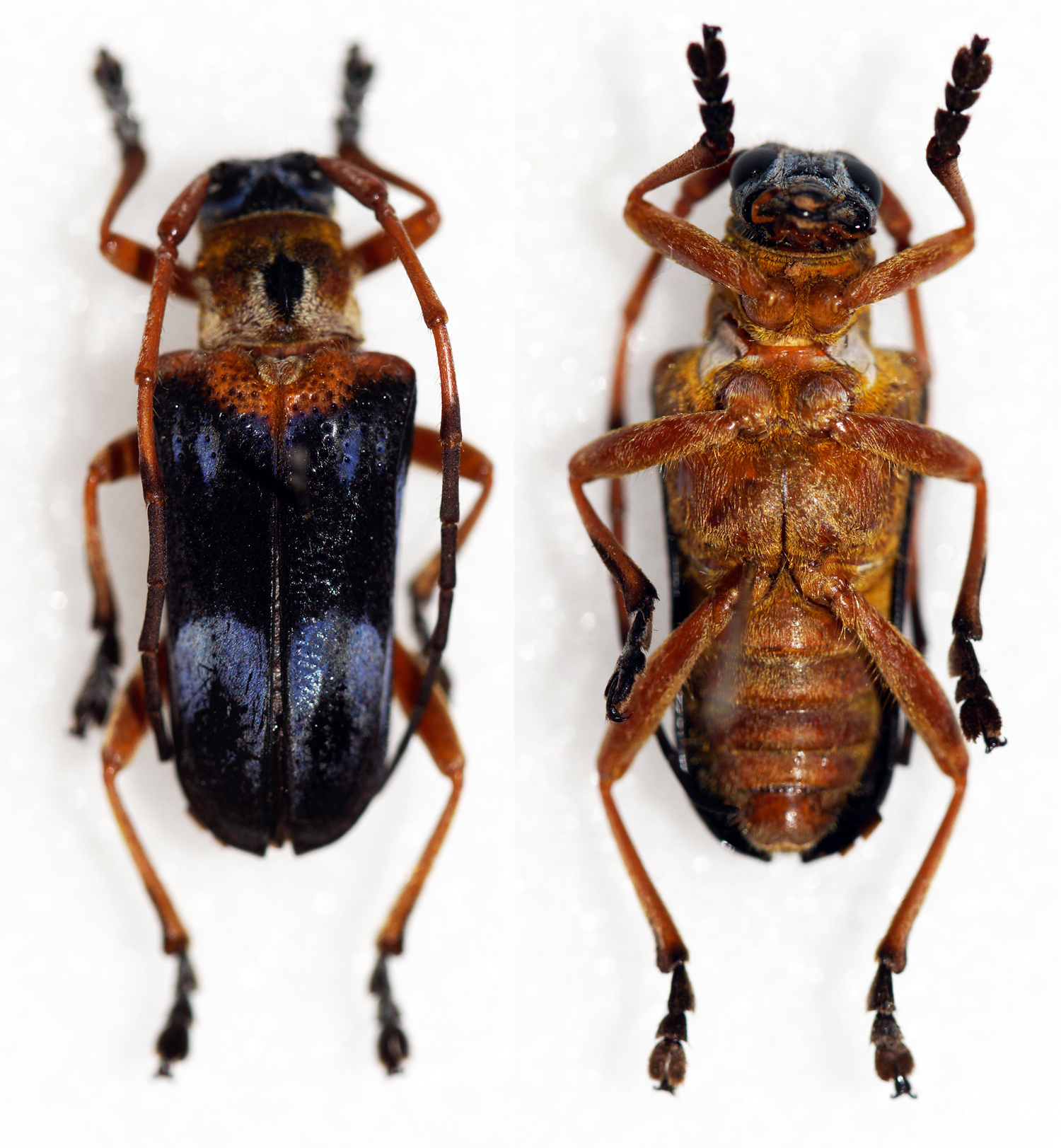 Breuning,1961 Sex: ? Data: 06-2014 - Sapa MT - Lao Cai prov - Vietnam Size: ?